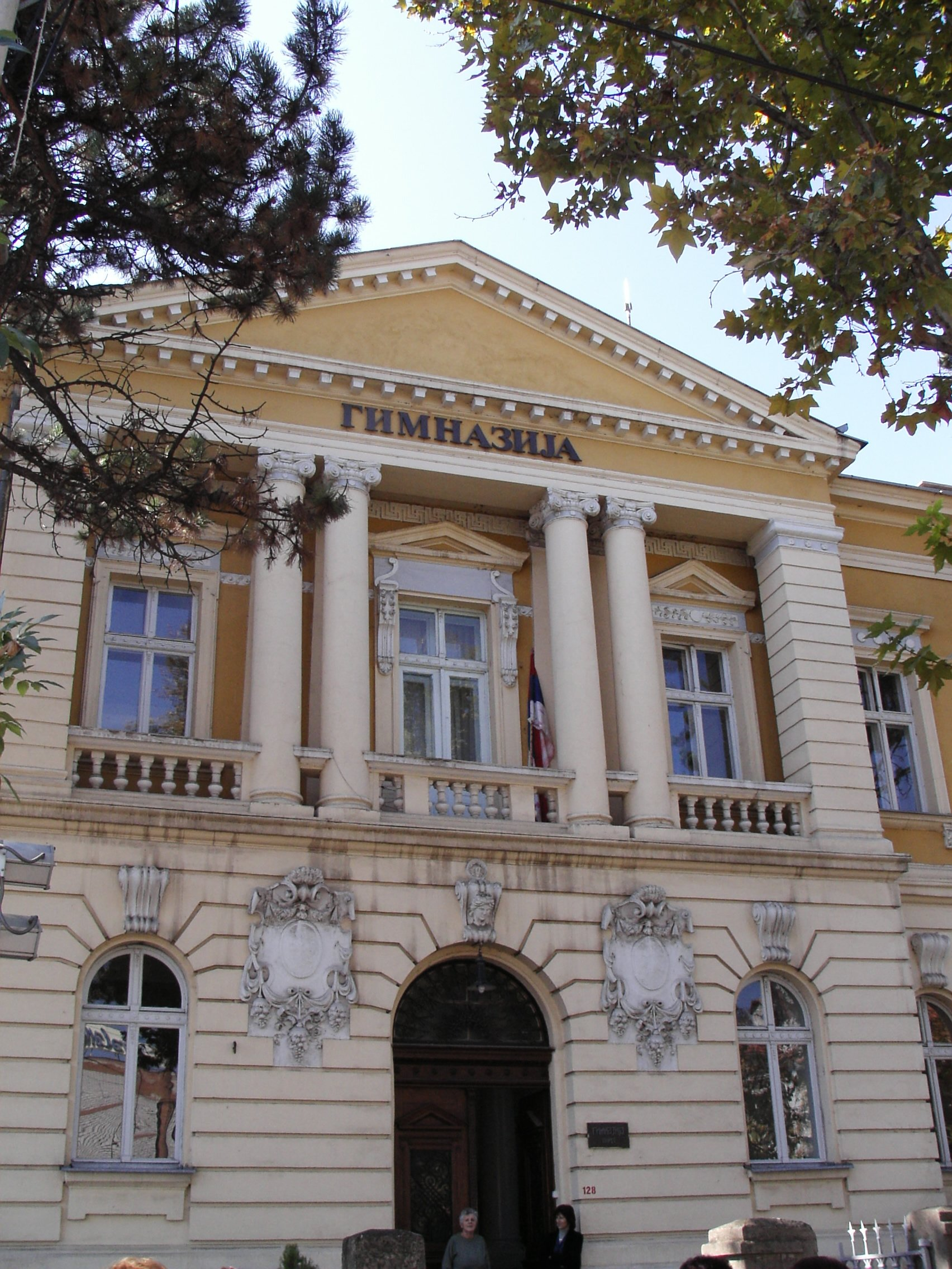 Улаз у Гимназију